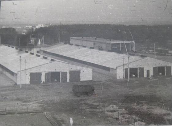 Молочно-товарницький комплекс с. Мирне